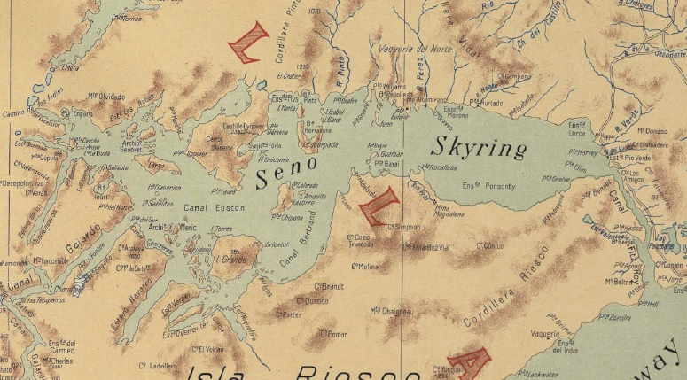 La imagen es un detalle del “Atlas Centenario”, desarrollado por la Oficina de Mensura de Tierras del Gobierno de Chile dirigida por don Luis Risopatrón con ayuda de los cartógrafos Nicanor Boloña y Luis Ossandón. Esta obra fue desarrollada por orden del Presidente de la República don Pedro Montt y publicada en el año del centenario de la república en 1910.